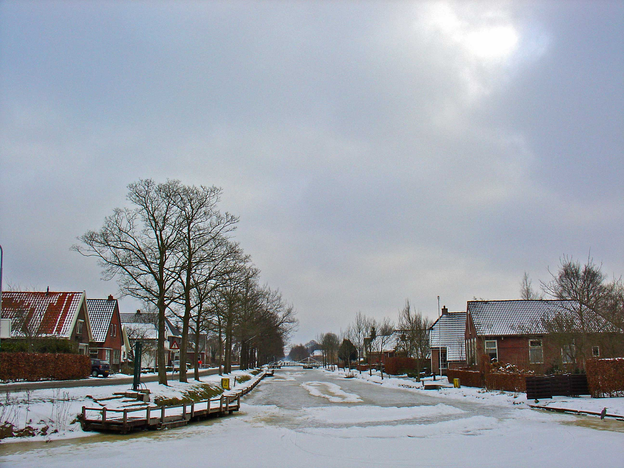 Grevelingskanaal met Annerveenschekanaal